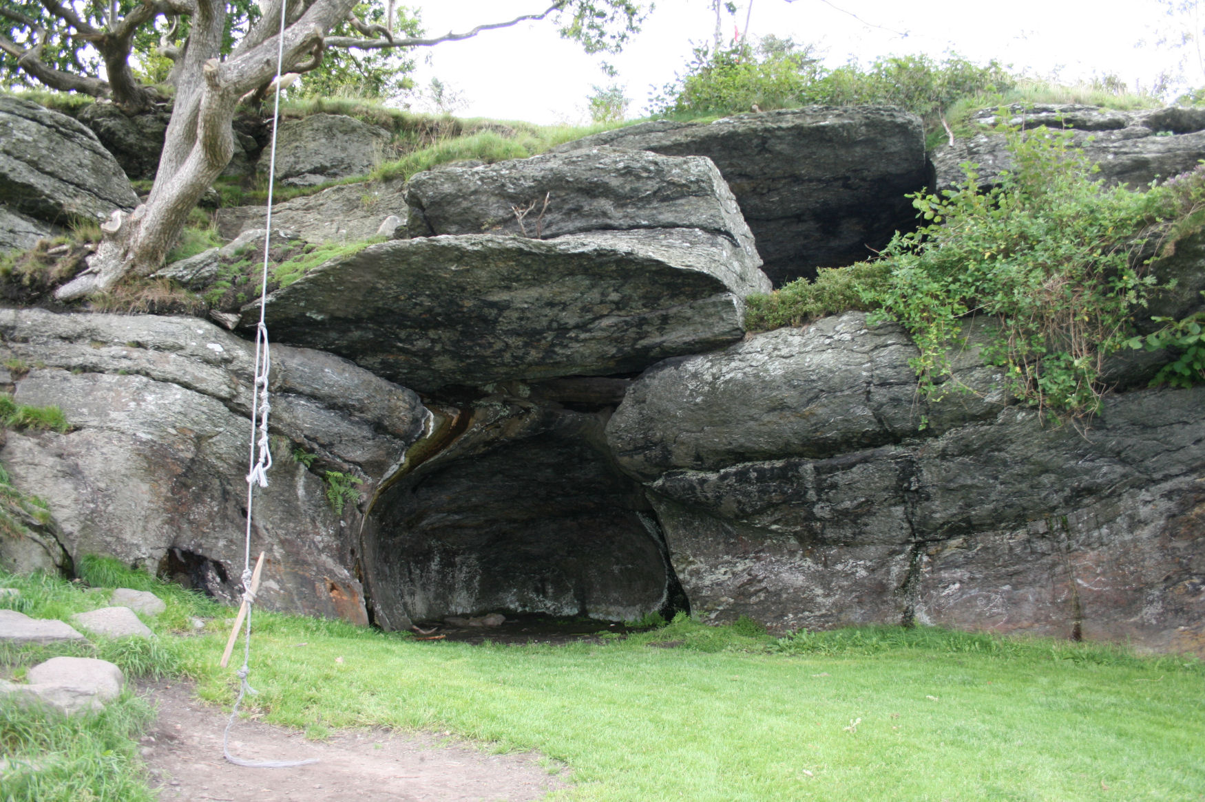 Vistehola, Randaberg Norway